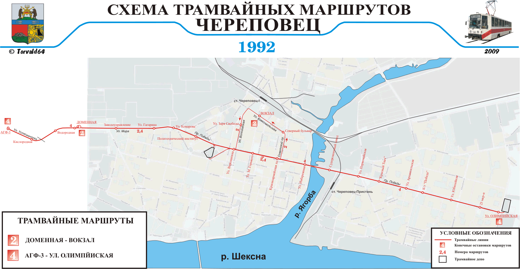 Схема трамвайных маршрутов Череповца 1992 г.